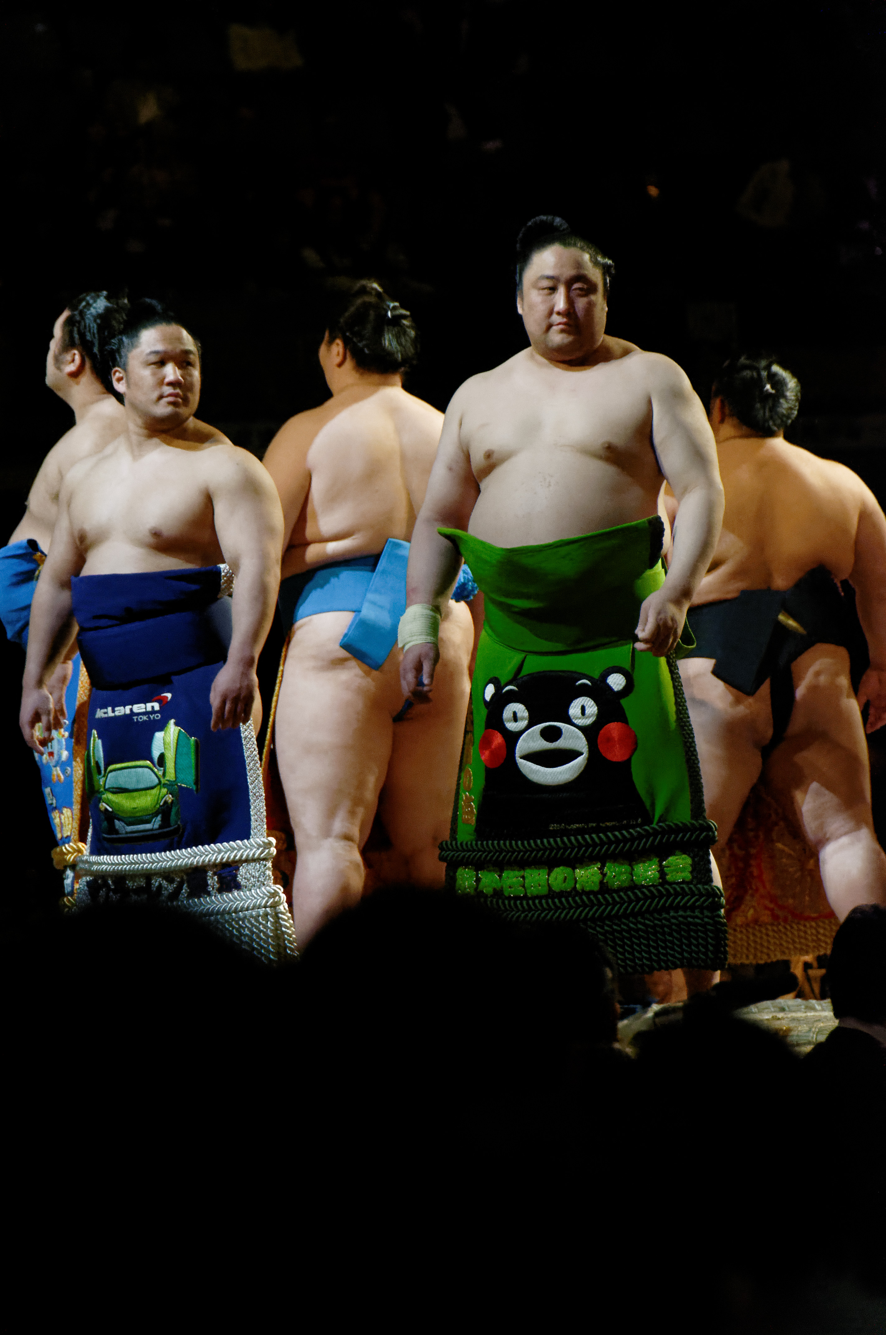 DSC_4626_DxO